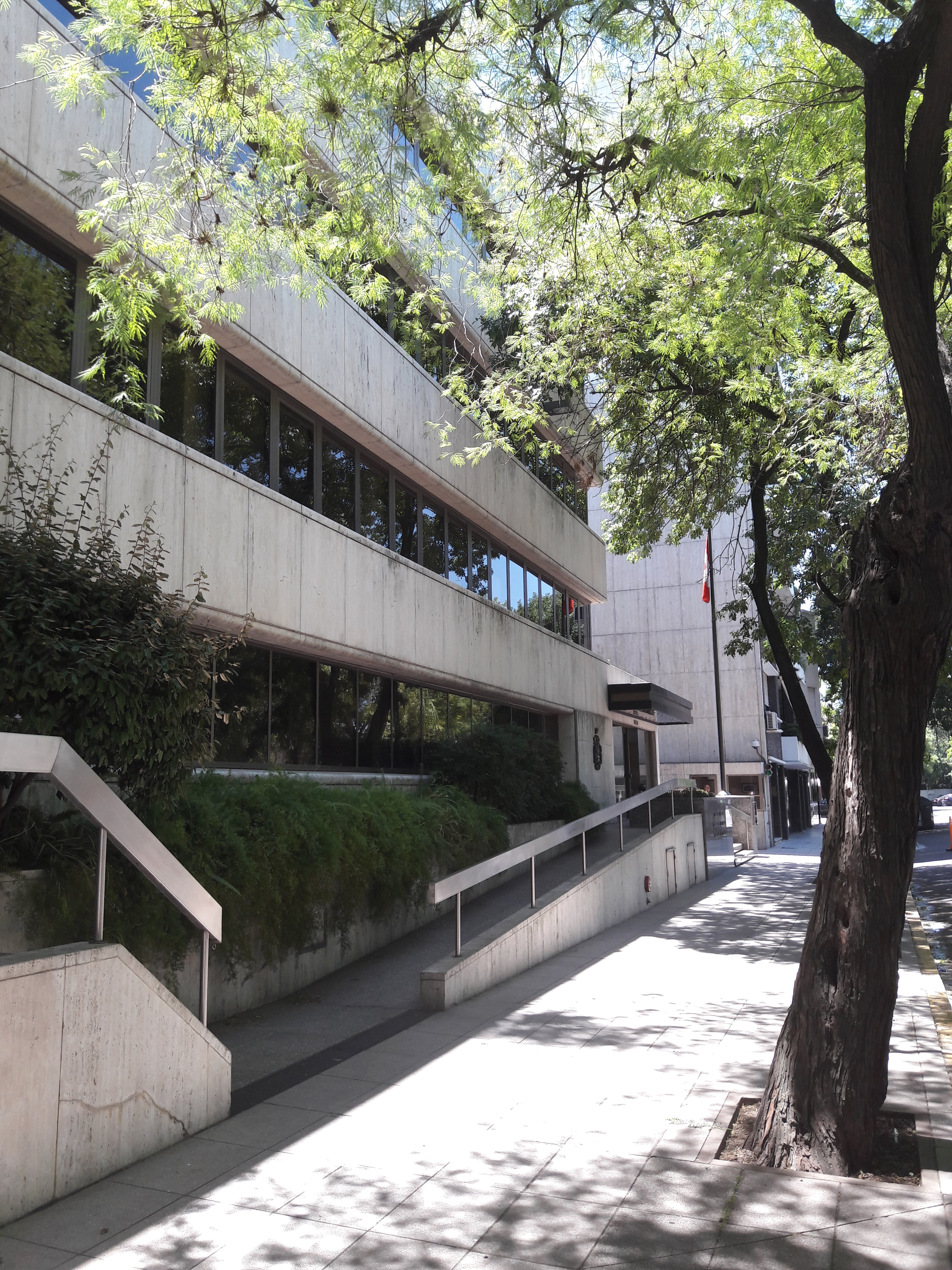 Embajada de Canadá, Palermo, Buenos Aires, Argentina.